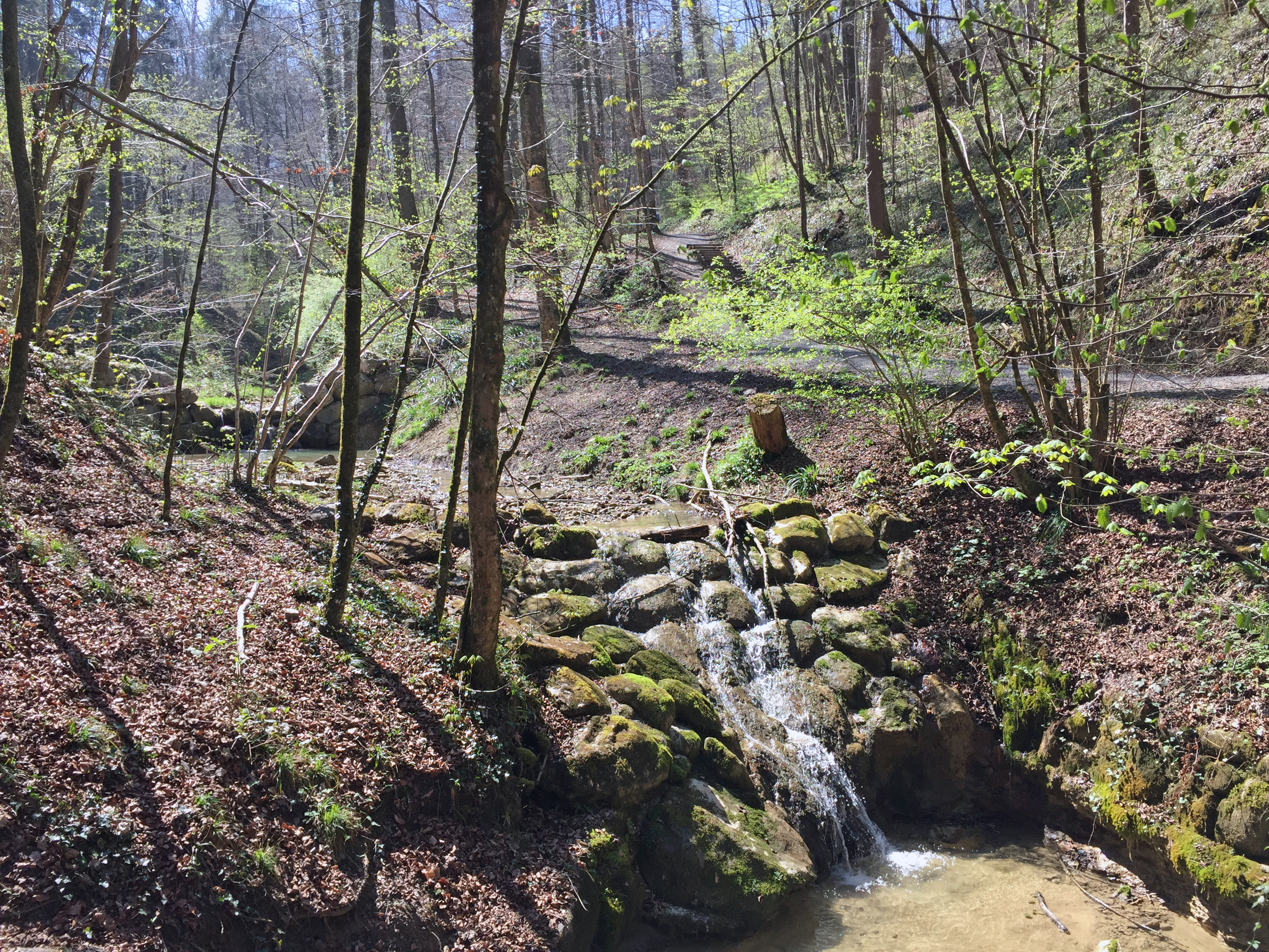 Sagentobelbach beim Zoo